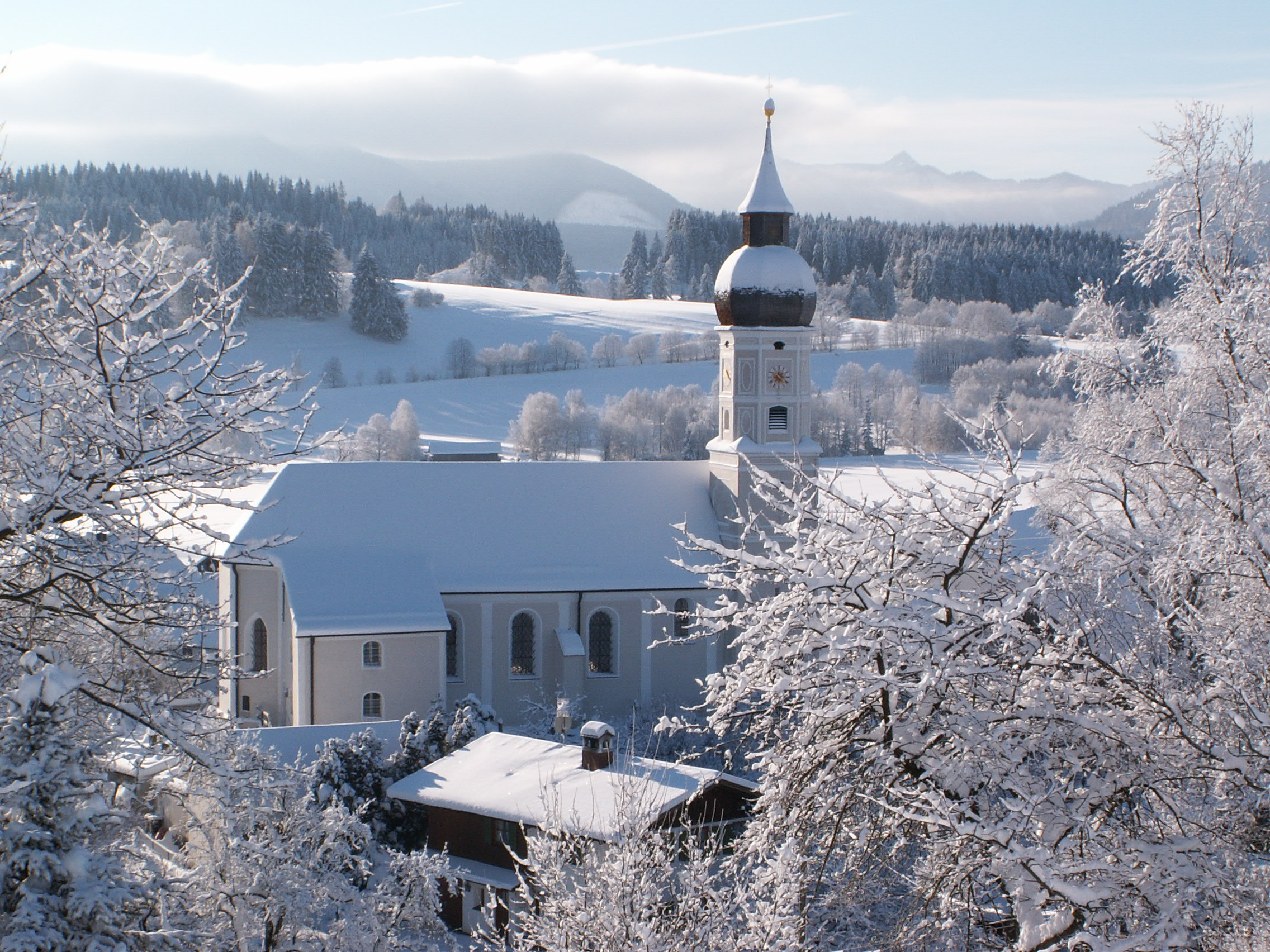 Bad Bayersoien - Kirche im Winter